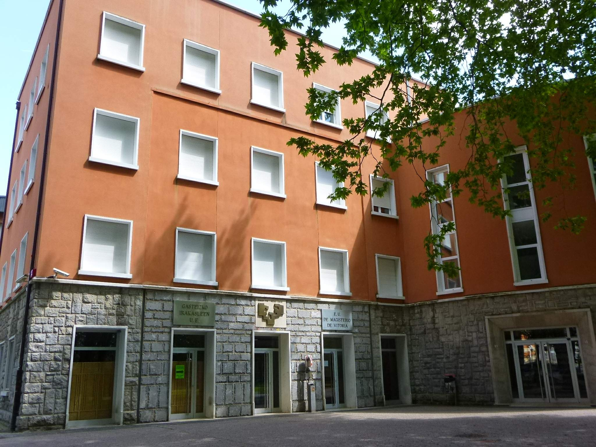 Escuela Universitaria de Magisterio (UPV-EHU), en Vitoria